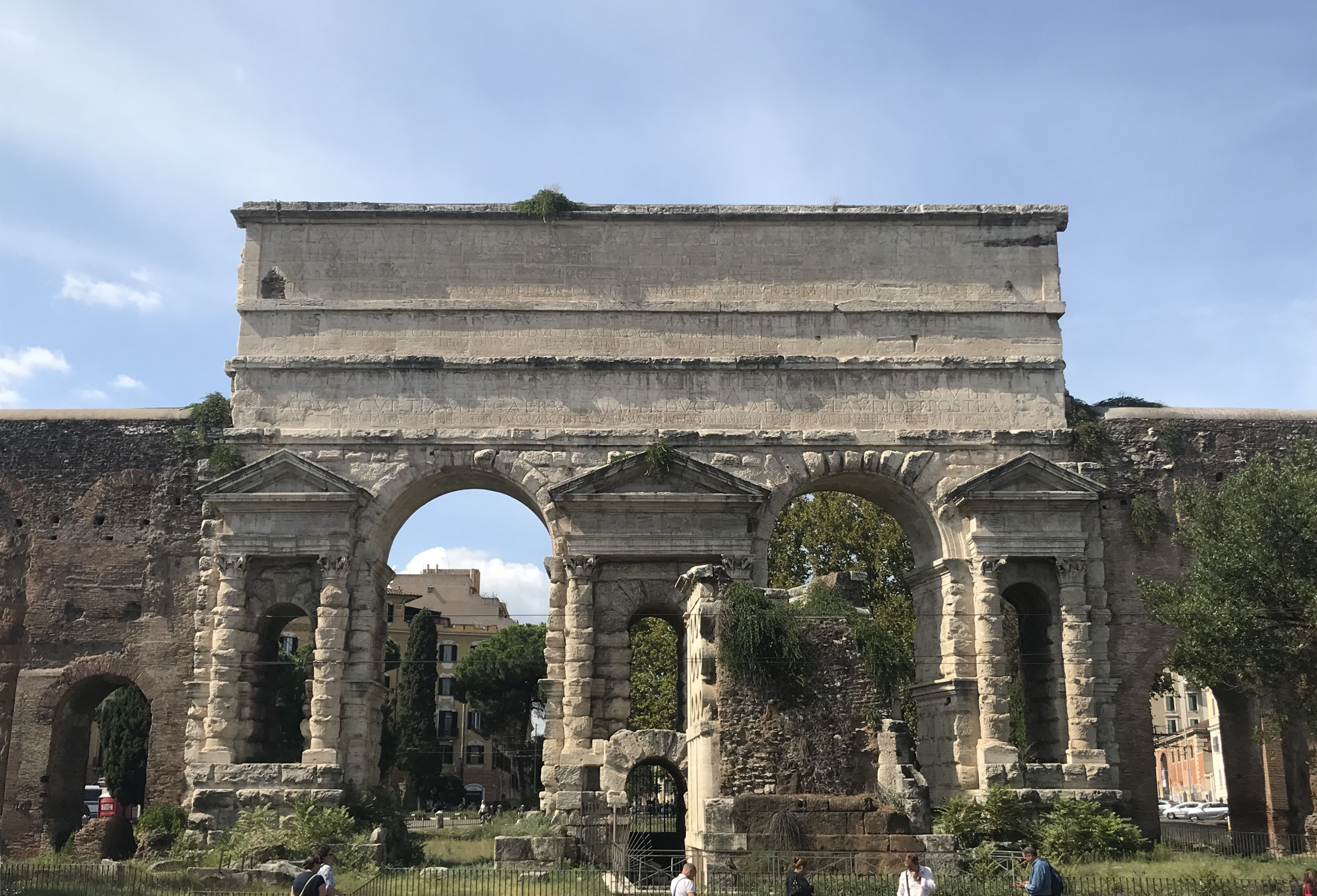 Porta Maggiore a Roma